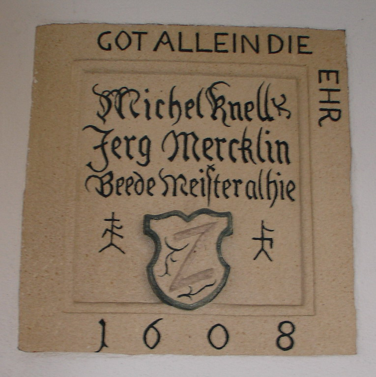 Inschrift am Rathaus der Gemeinde Wolfschlugen andere Versionen: n/a